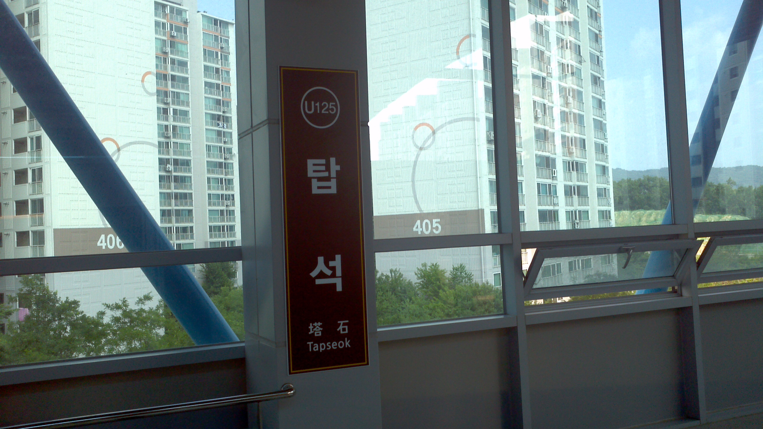 탑석역 역명판